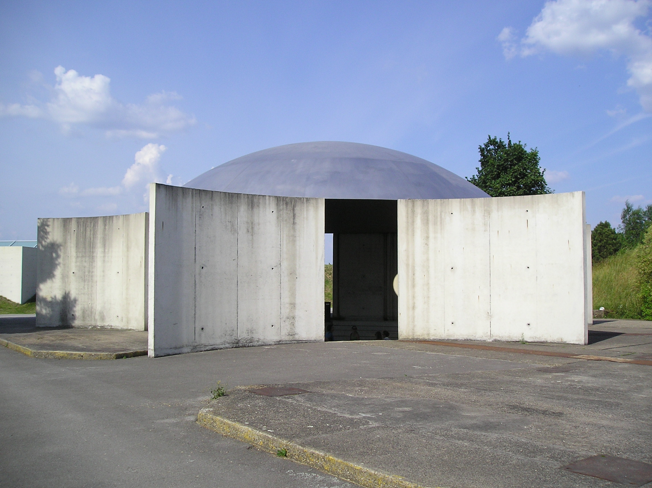 Raketenstation, Katsuhito Nishikawa, Begehbare Skulptur